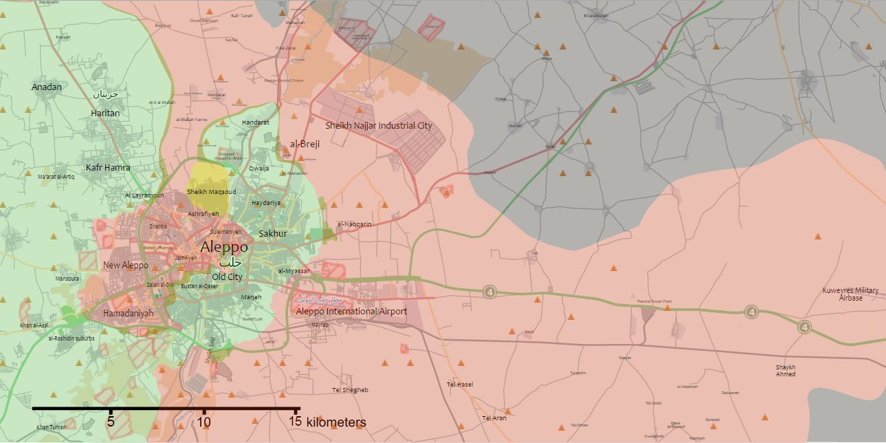 Alep, le 30 août 2016.